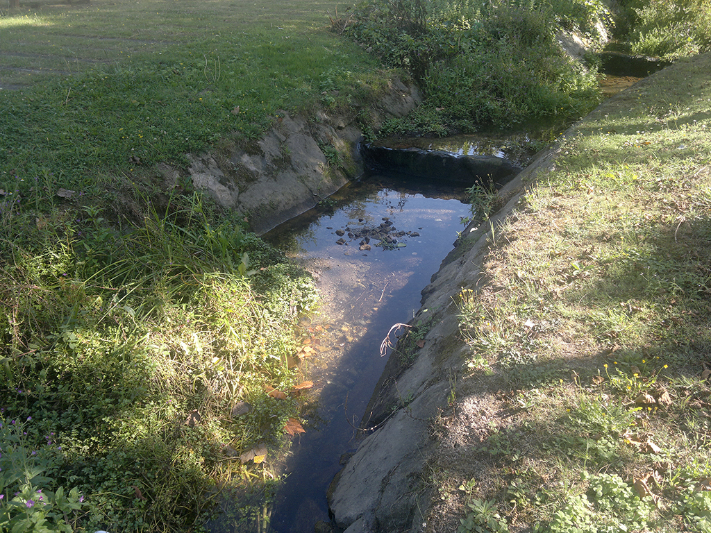 Río Lagar (Elviña, A Coruña).